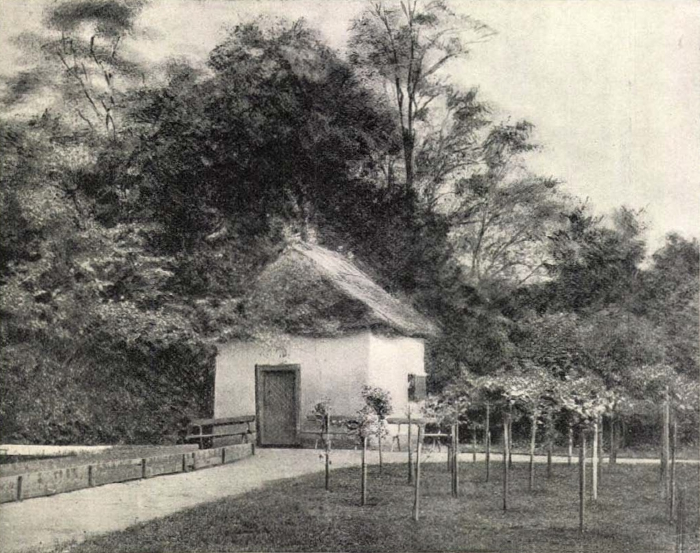 Arany János lakása a geszti parkban